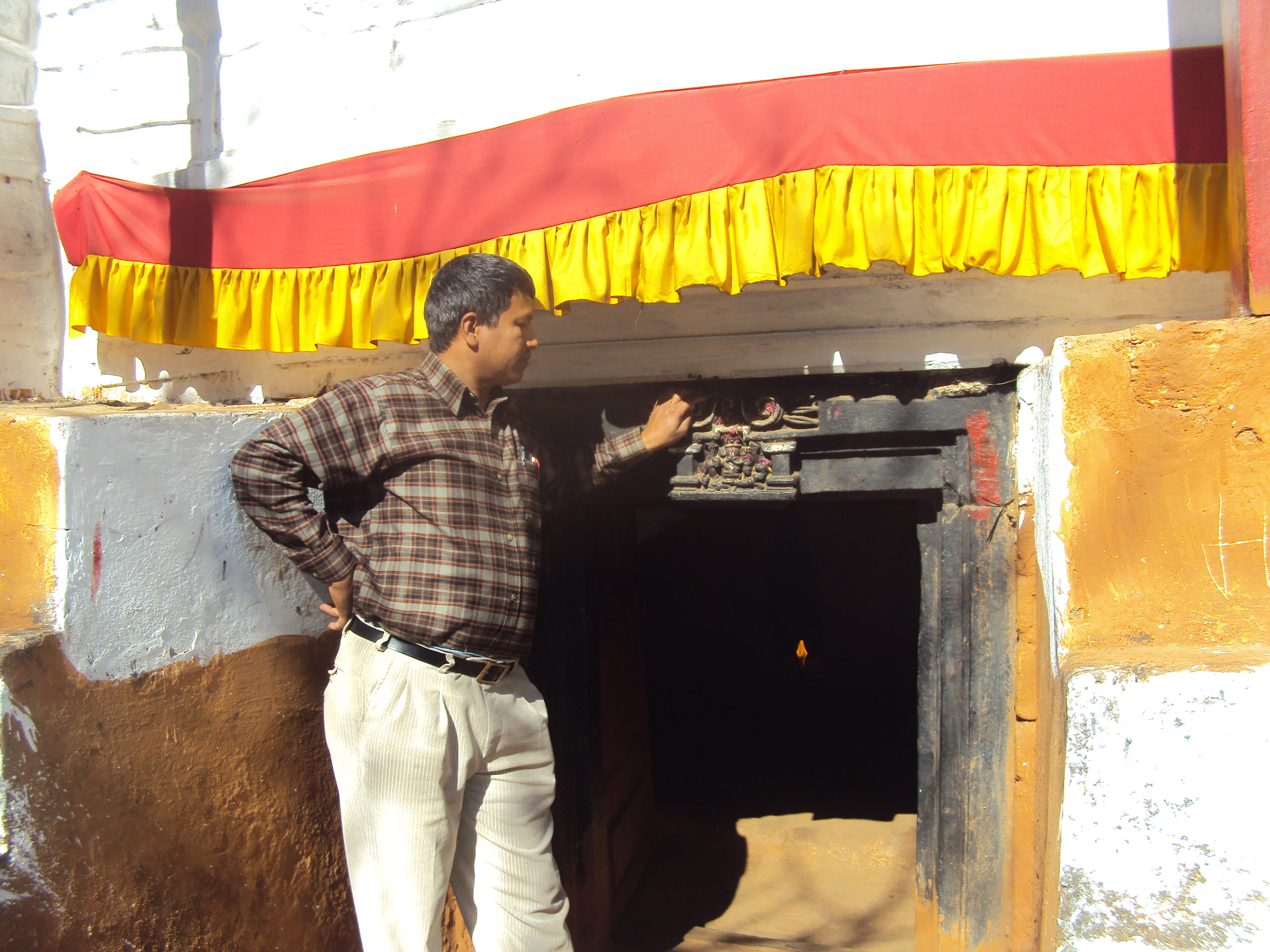 नेपाली: शिरस्थान ज्वालामठ दैलेख